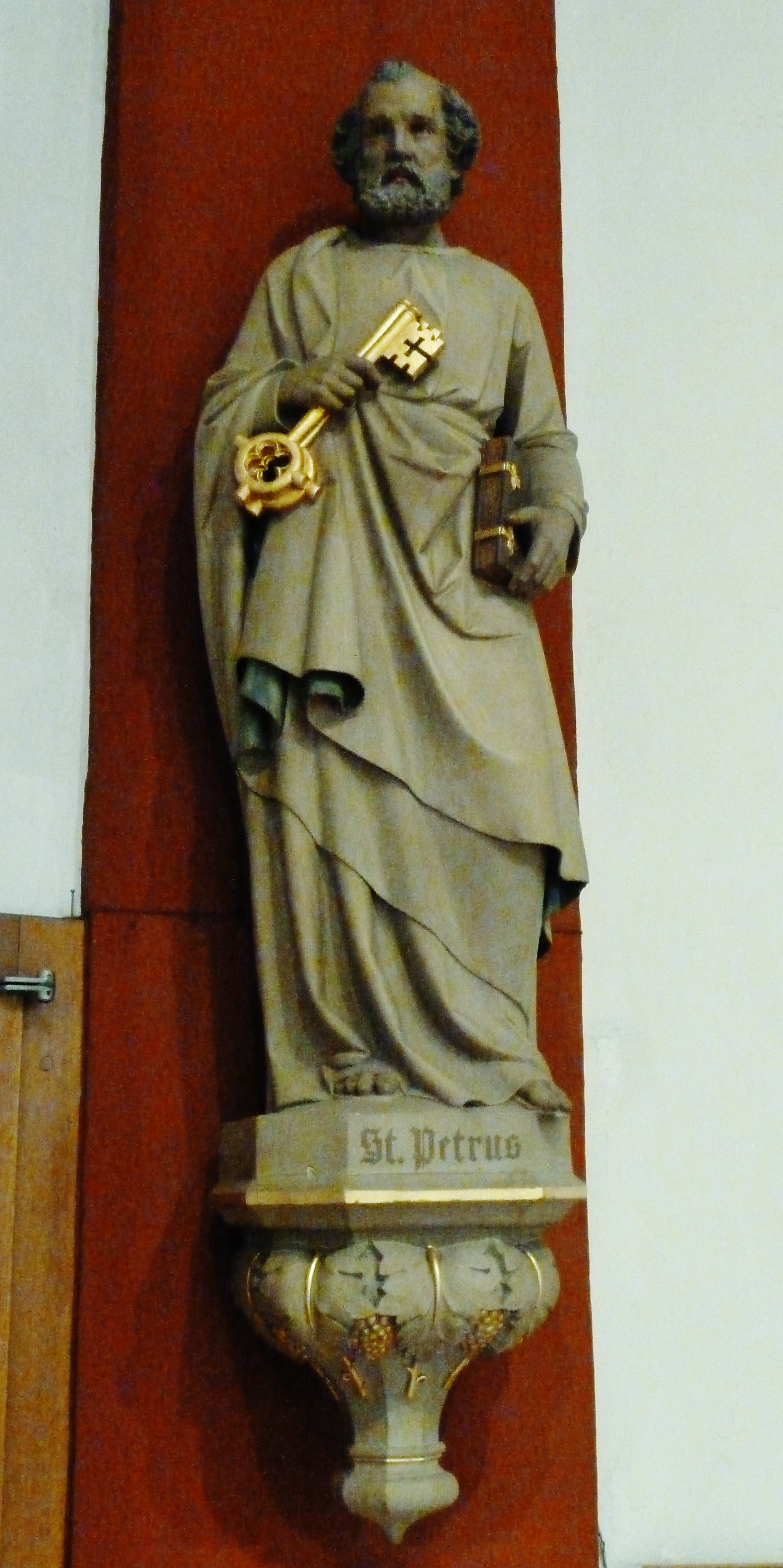 Figur des Apostels Petrus in der St. Petrus Kirche Gesmold